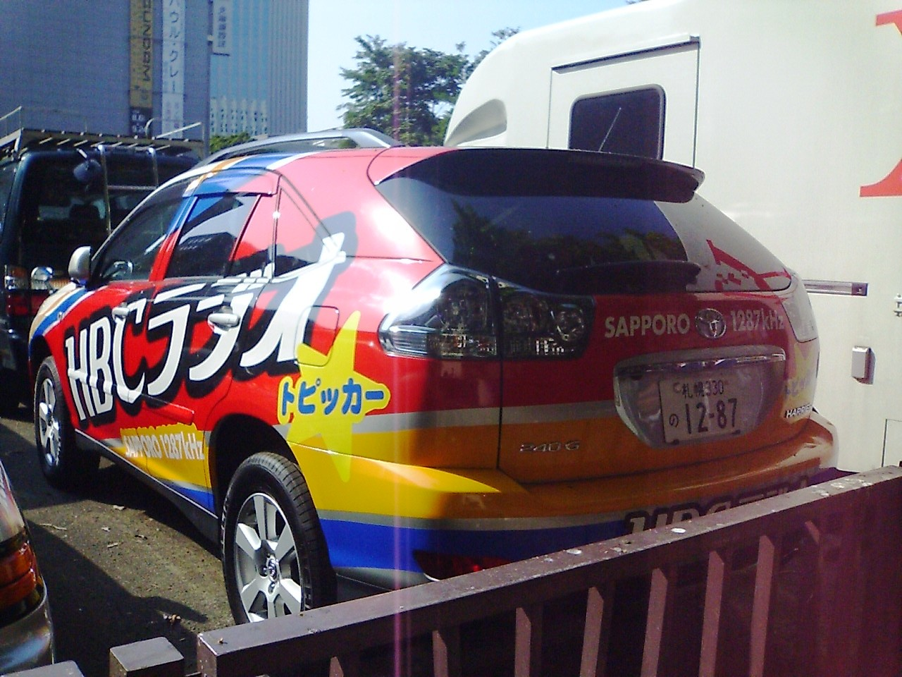 HBCラジオのトピッカー。